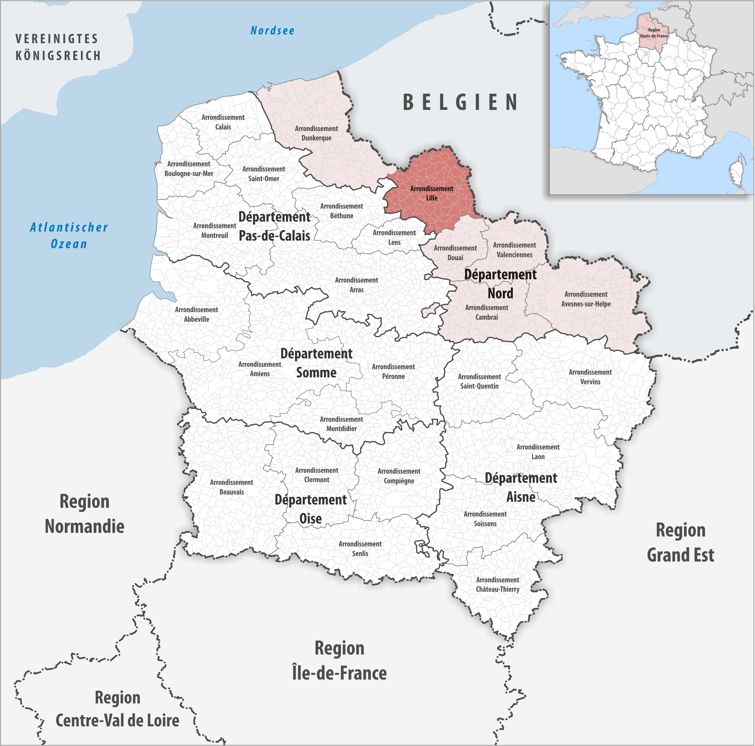 Lage des Arrondissements Lille